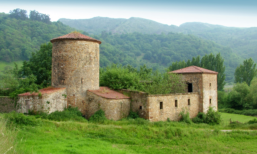 Ref.0096.Castillo de Olloniego